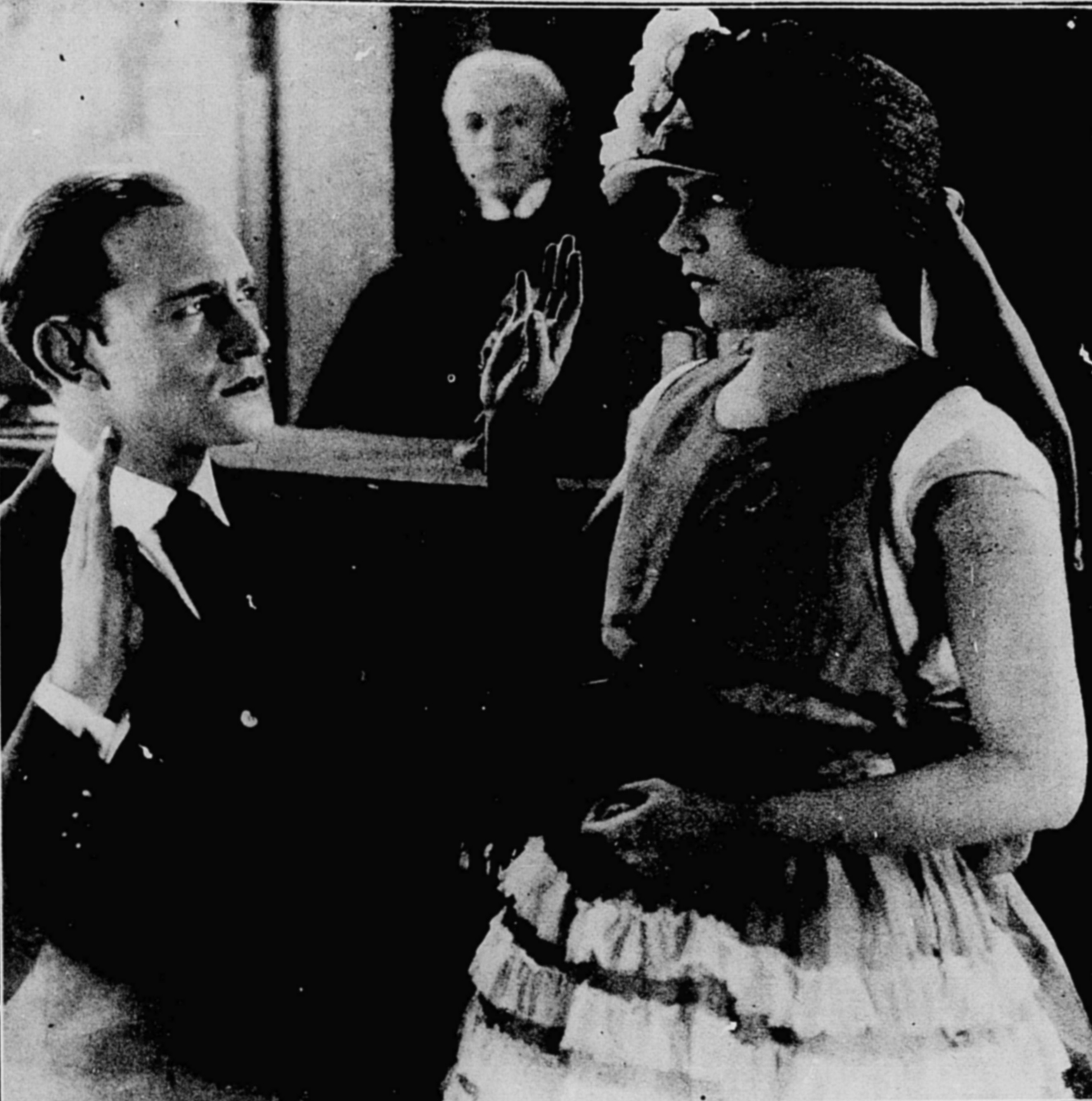 Babe (Alice Lake) presta juramento no julgamento de Edward Felton, junto ao advogado Dick Talbot (Conrad Nagel), no filme "Hate" de 1922, publicado na edição de 14 de dezembro de 1923 da revista "A Scena Muda".